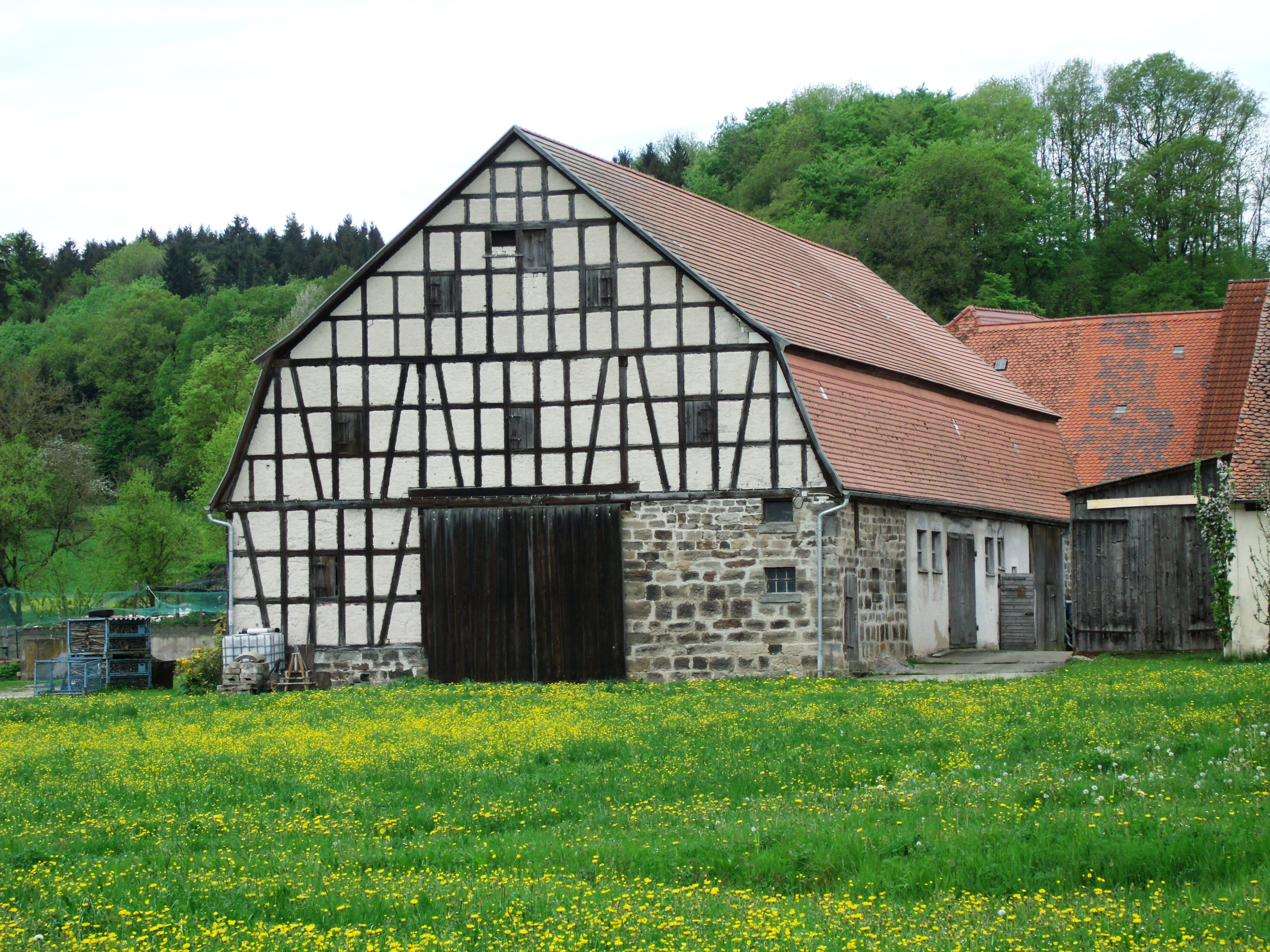 Aidenau, Ortsteil von Geslau im mittelfränkischen Landkreis Ansbach, Fachwerkstadel